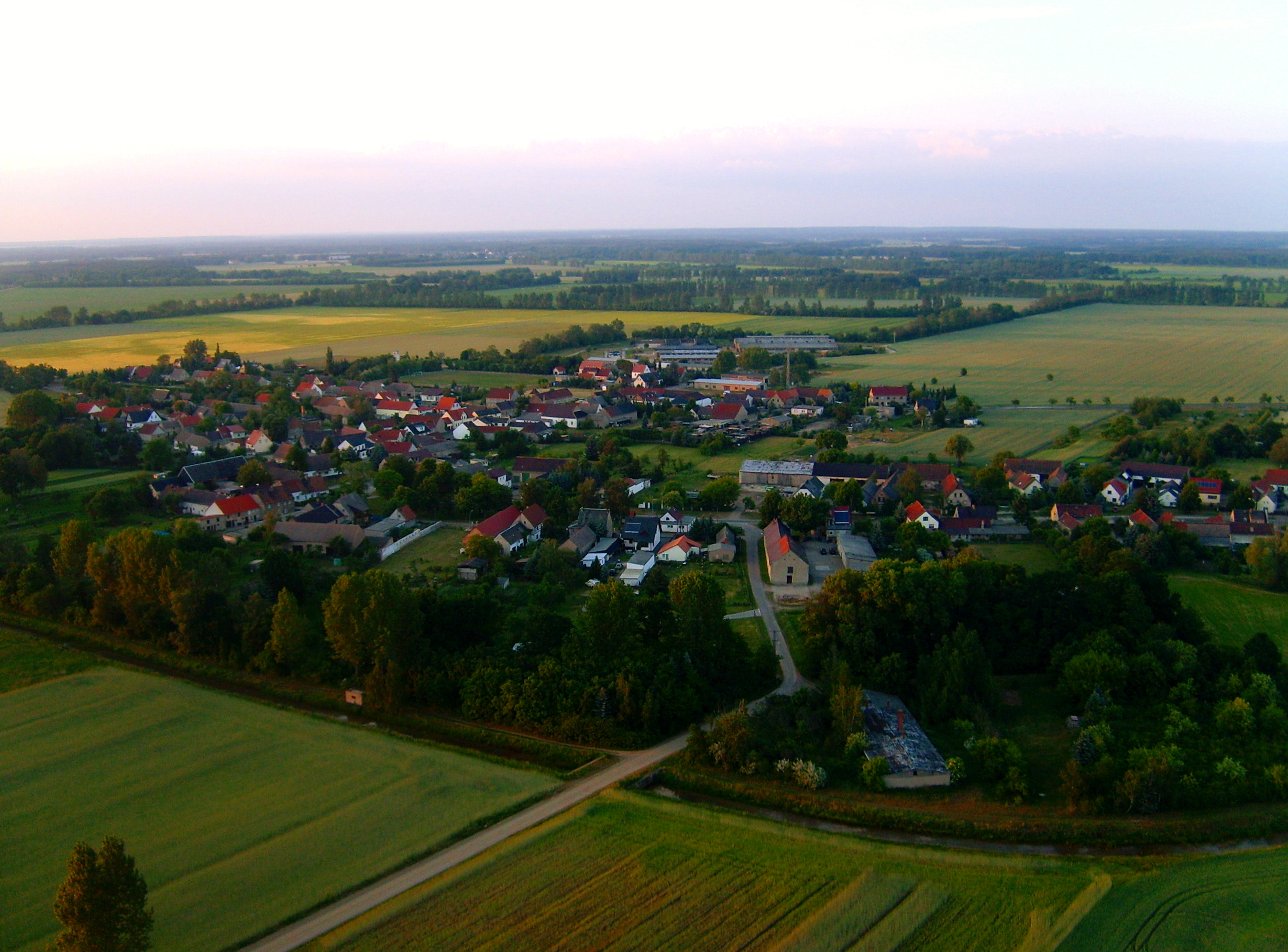 Der Ort Lausitz aus der Luft.